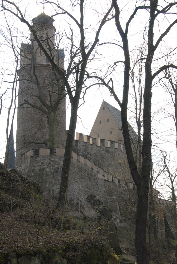 Burg und Schloss Stein, Nordansicht der Oberburg